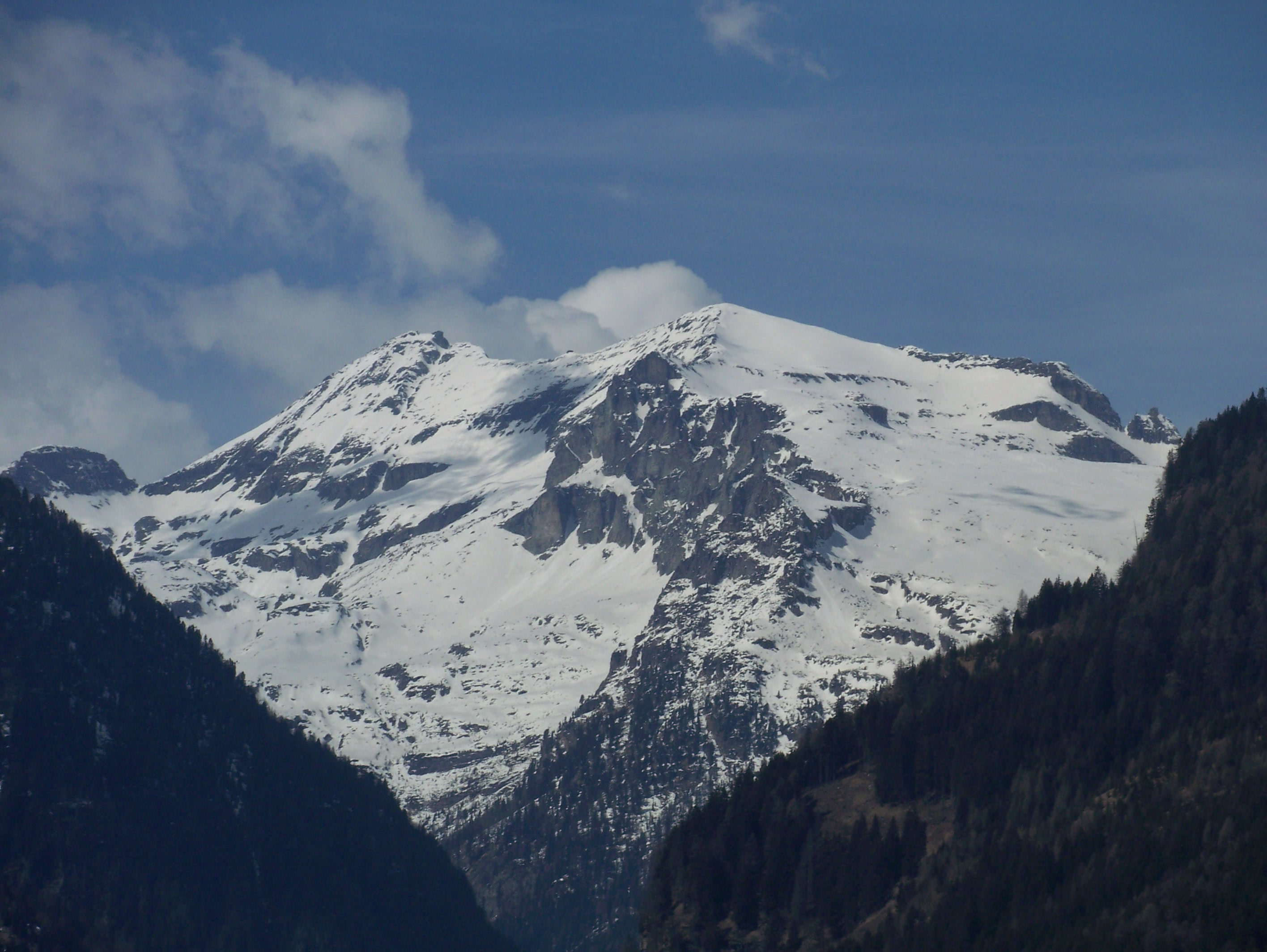 Großes und Kleines Reißeck (Tauern, Österreich)